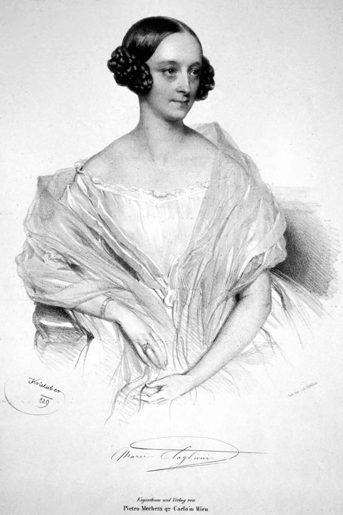 Maria Taglioni die Ältere